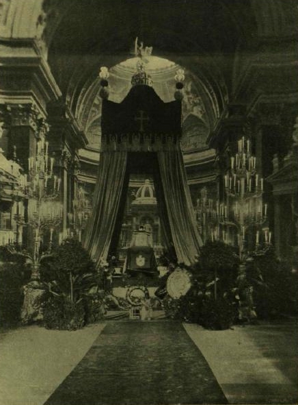 Rákóczi hamvainak hazahozatala, a budapesti ravatal a Szent István templomban, Vasárnapi Ujság, fotó illusztráció 1906. 44. szám